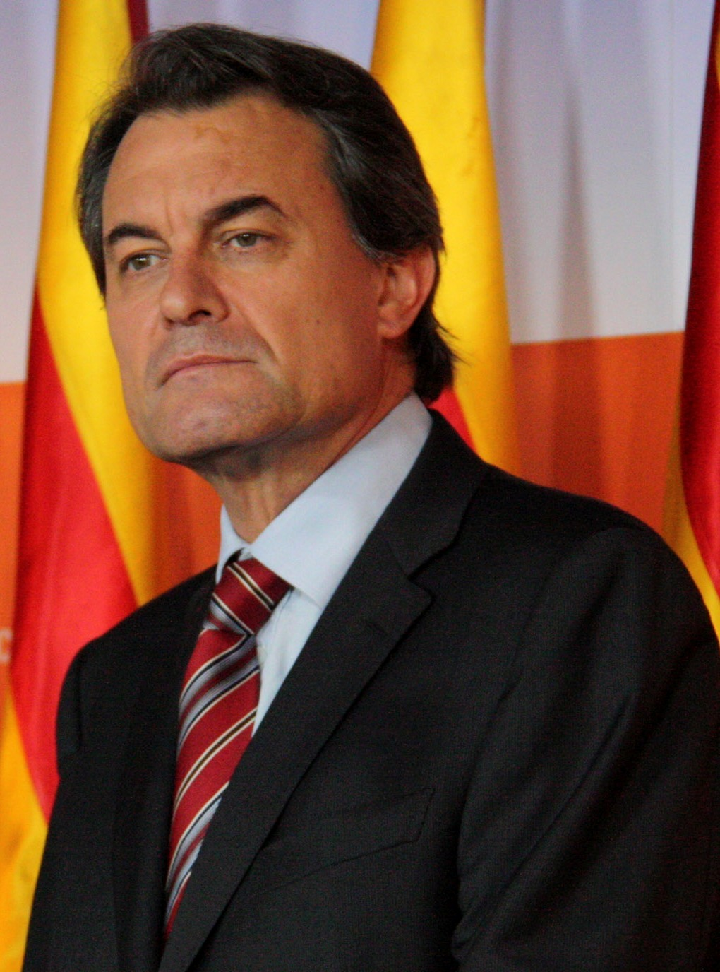 President of Catalonia